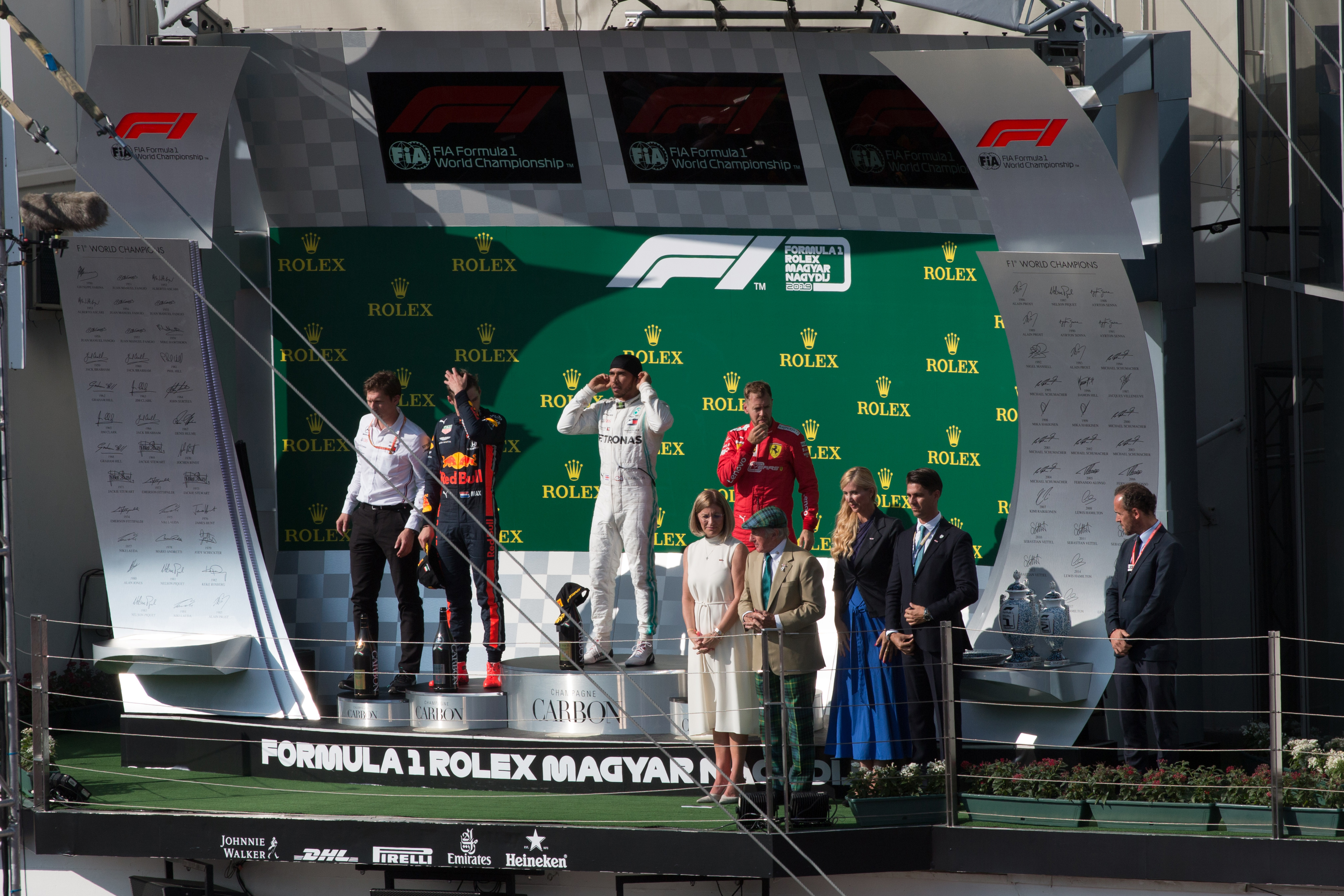 Winning ceremony after 2019 Formula 1 Hungarian Grand Prix, inluding Lewis Hamilton (1st), Max Verstappen (2nd) and Sebastian Vettel (3rd)